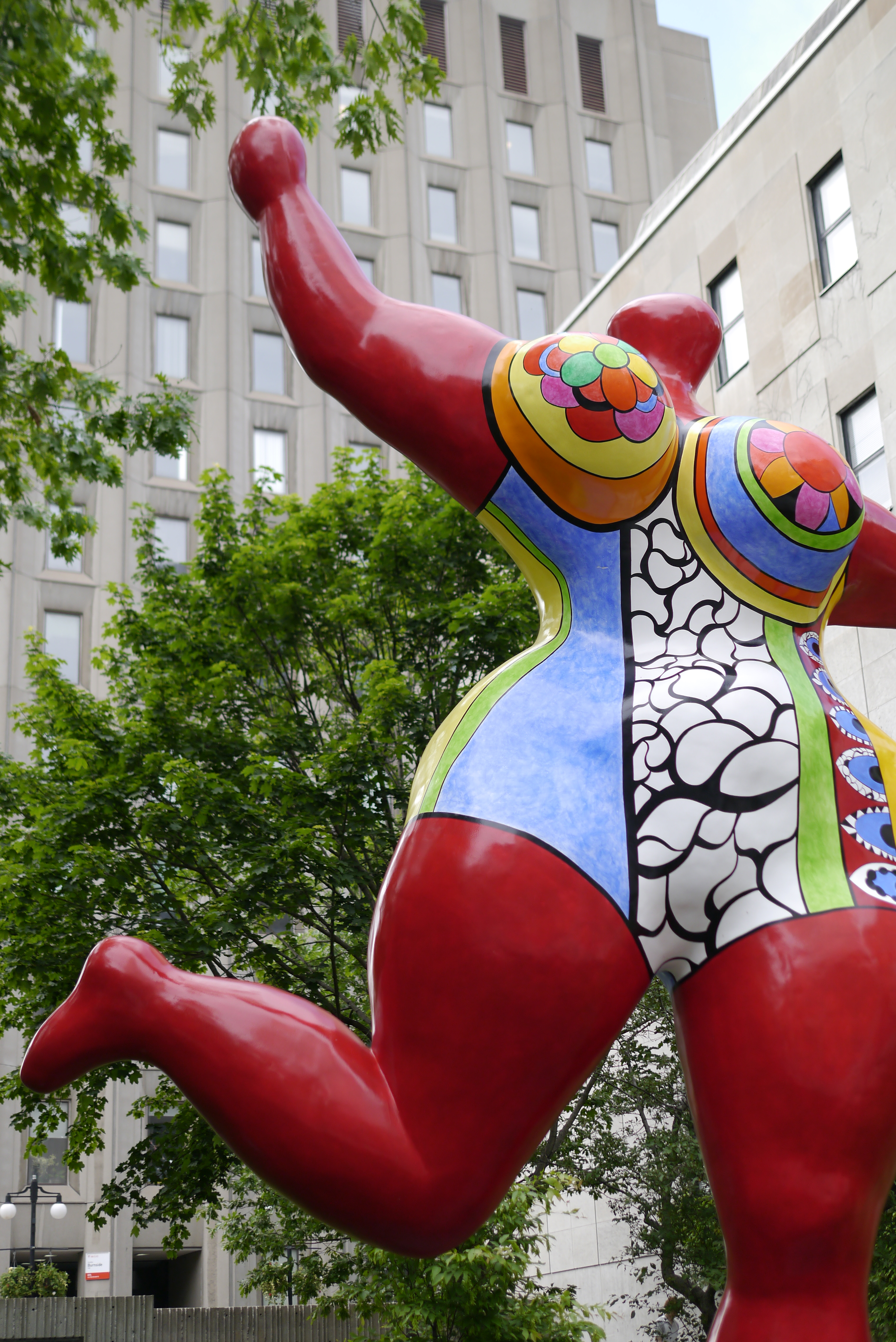 La Balade pour la Paix, rue Sherbrooke, Montréal Féministe associée aux Nouveaux Réalistes, Niki de Saint-Phalle s'engage notamment avec ses Nanas - des bonnes femmes en langage familier. En écho à Matisse, cette Nana danseuse, somptueuse Vénus rebondie et éblouissante, porte le nom de la petite-fille de l'artiste, Bloum. La plus grande de toutes ses Nanas, elle proclame la force et la joie de la femme libre et porte l'espoir d'un monde différent.